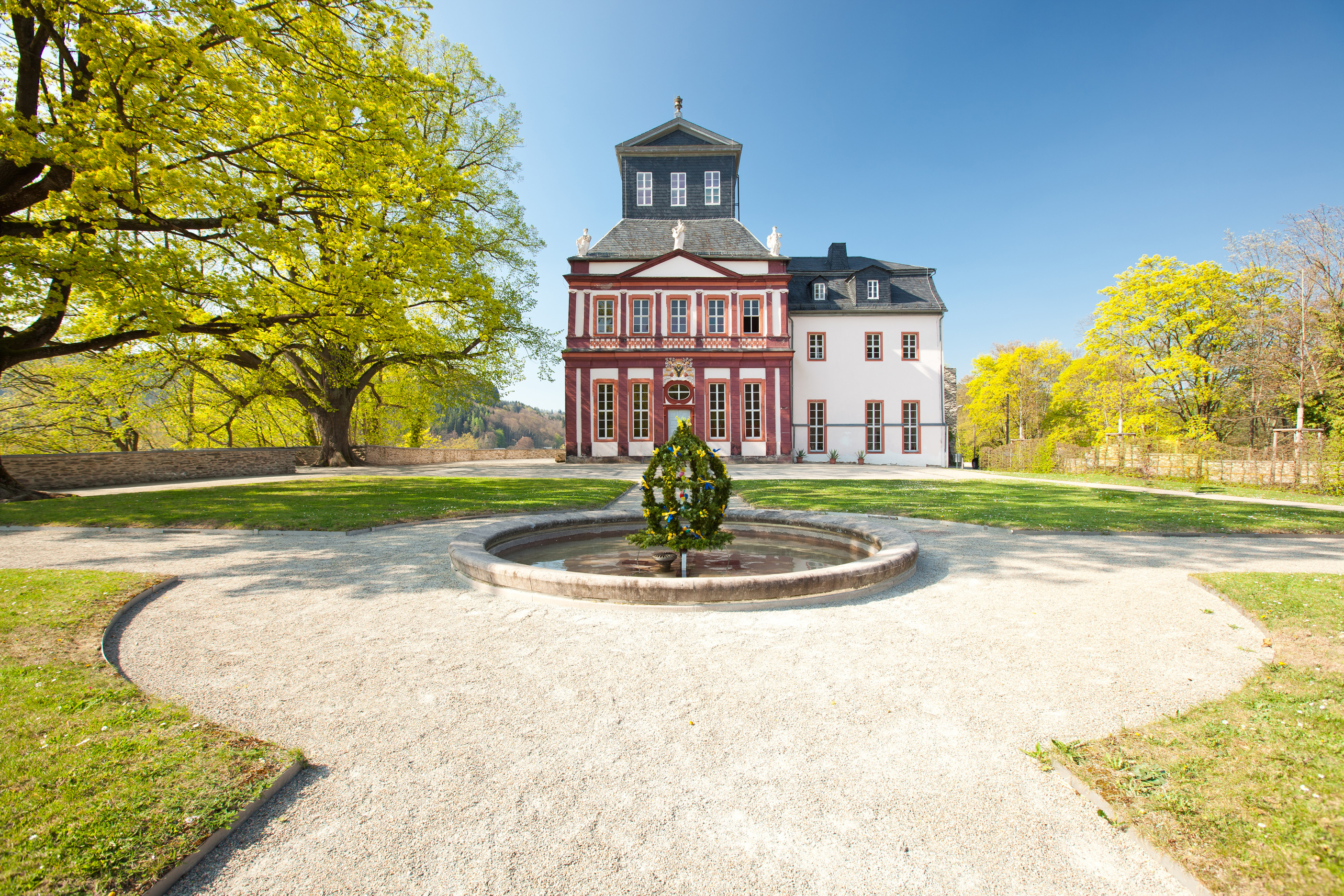 Kaisersaal